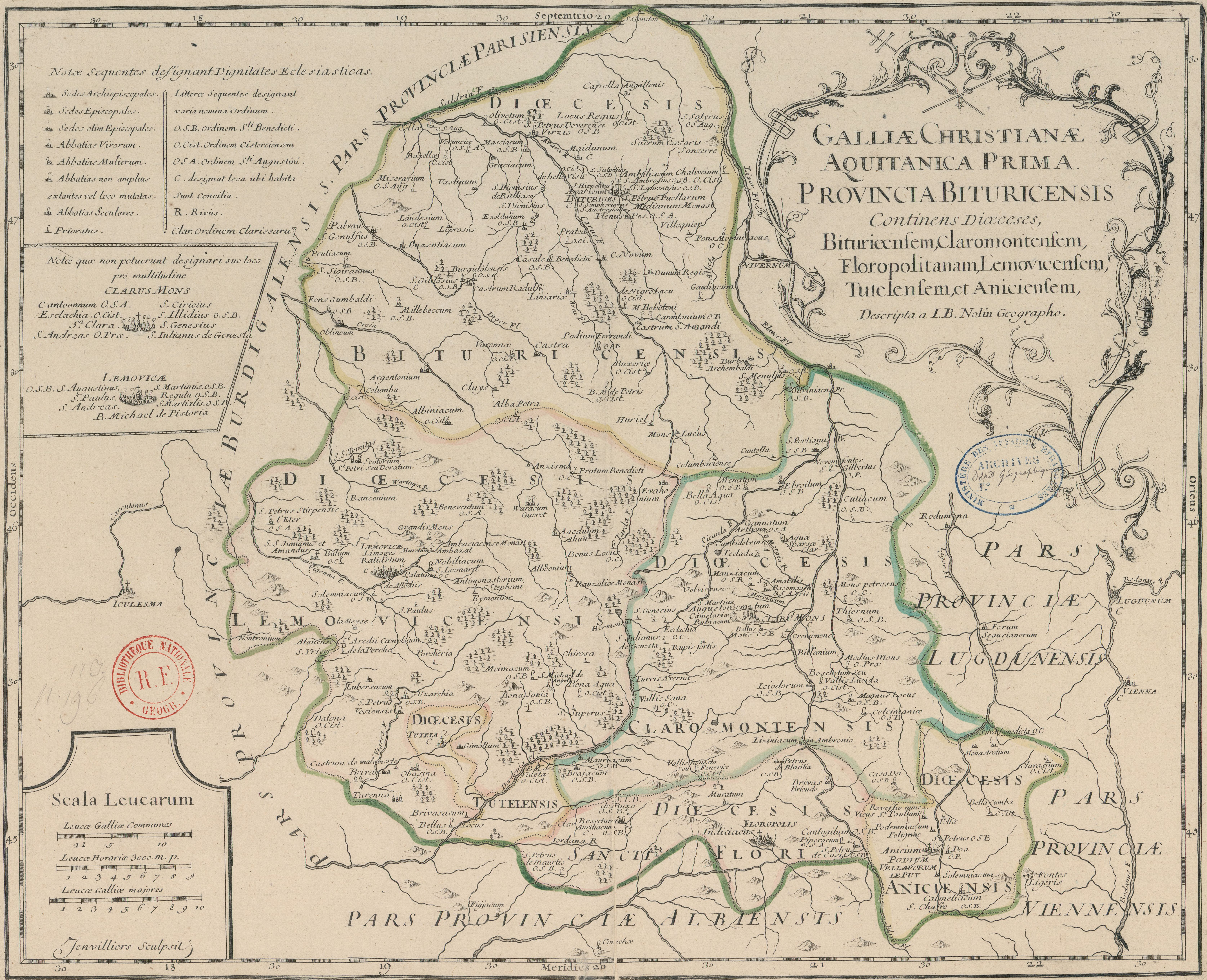 Carte de l'ancienne province ecclésiastique de Bourges, insérée dans le Tome 2 de la Gallia Christiana (1720).